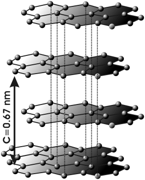 Graphit-Gitter